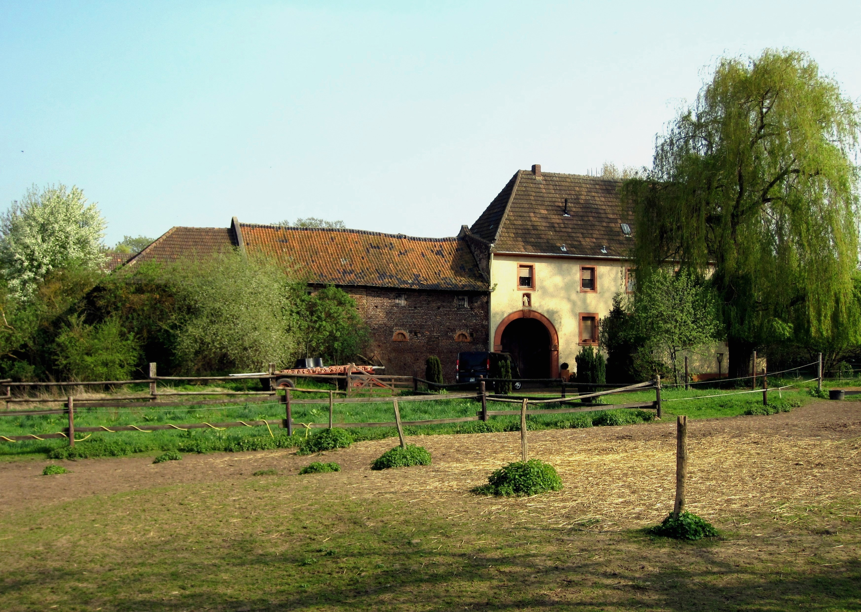 Dirmerzheim Tilmannshof